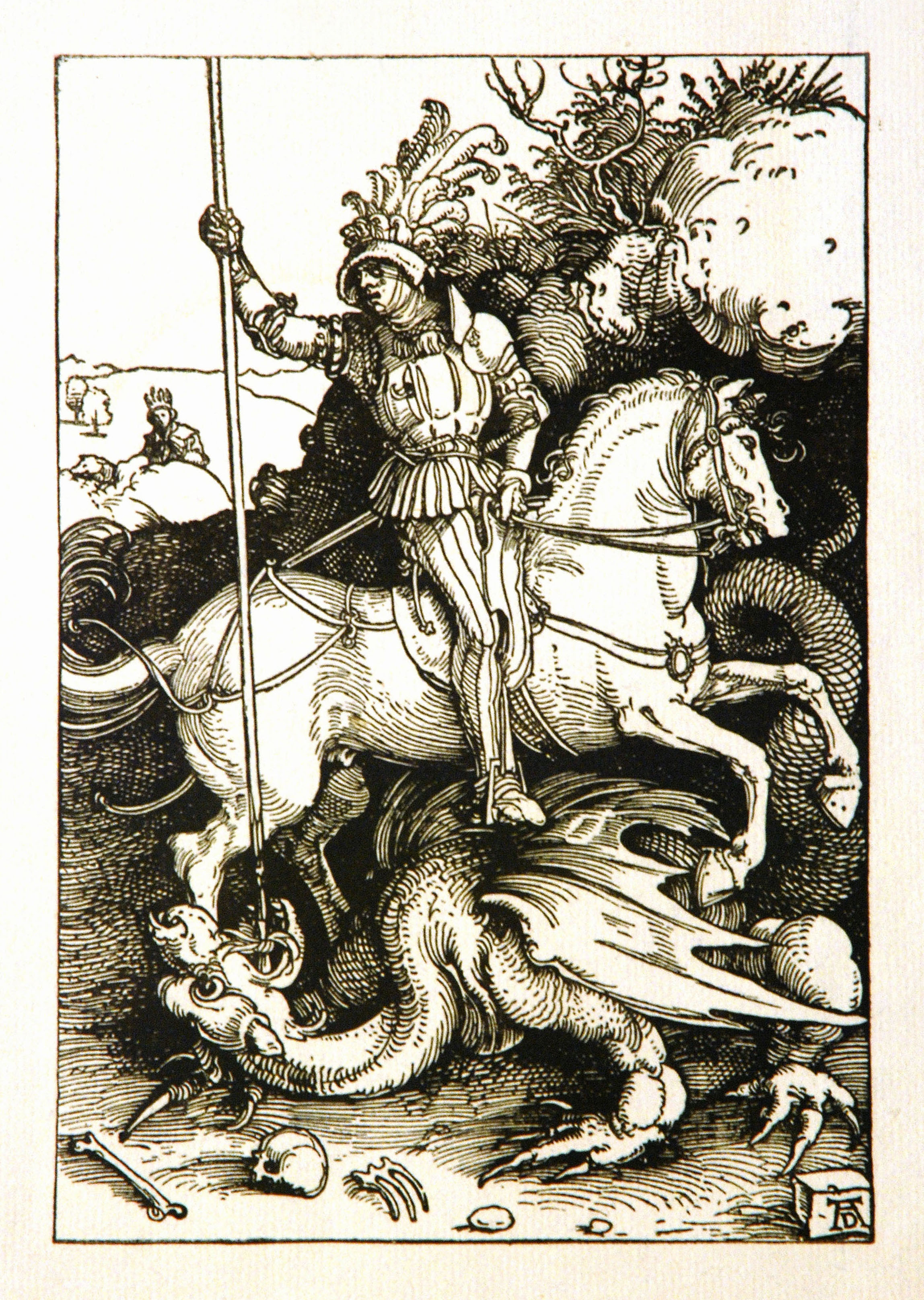 Dürer, Albrecht: Der heilige Georg. Holzschnitt 21 x 14,2 cm